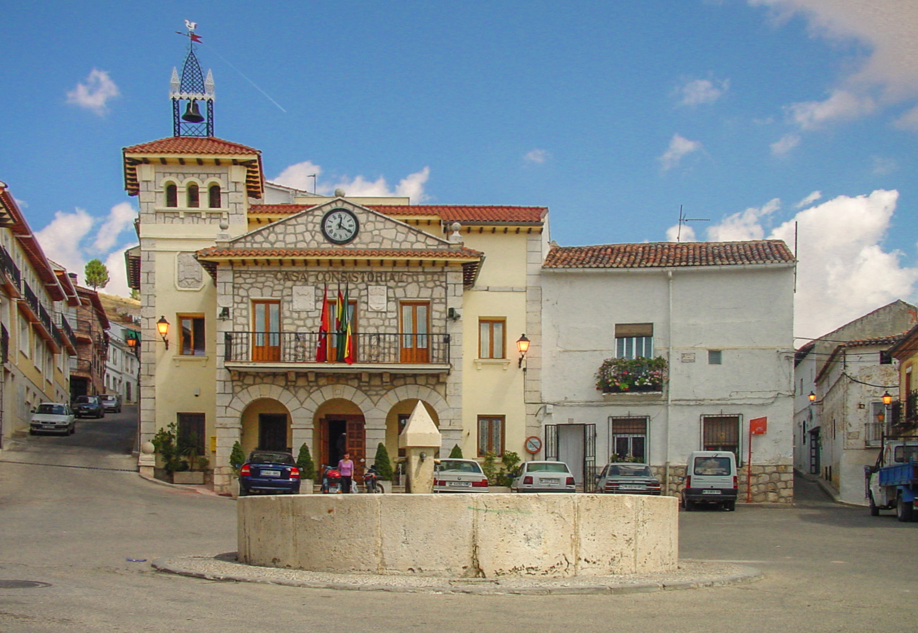 Ayuntamiento de Valdilecha.